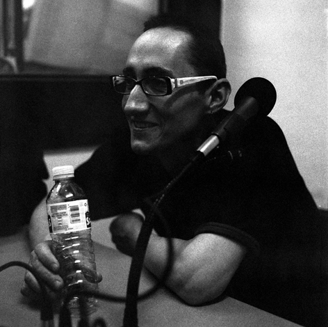 Iñigo Muguruza en Radio Vallekas